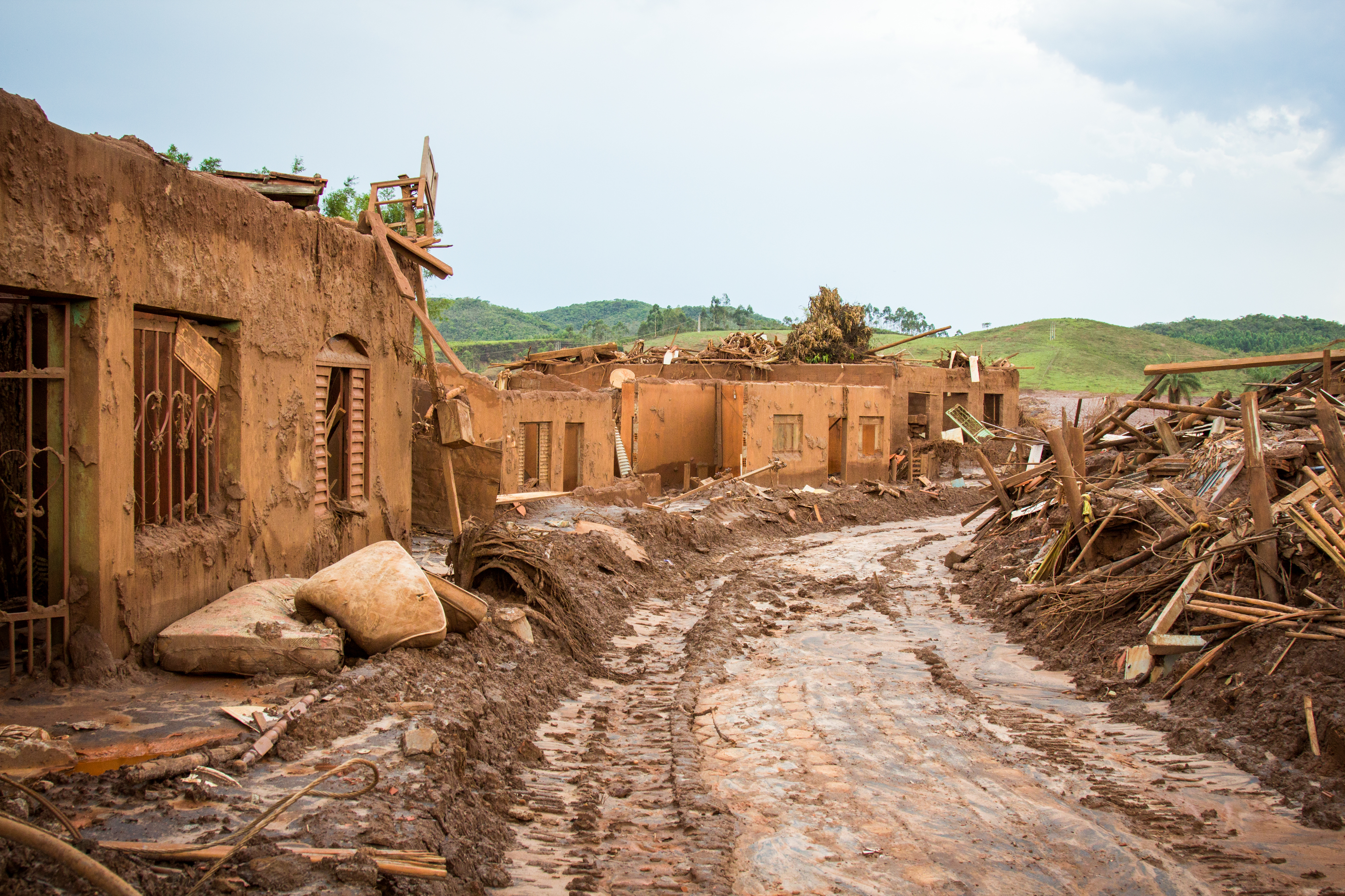 [2015-11-10] Visita à Bento Rodrigues-MG_113_Romerito Pontes